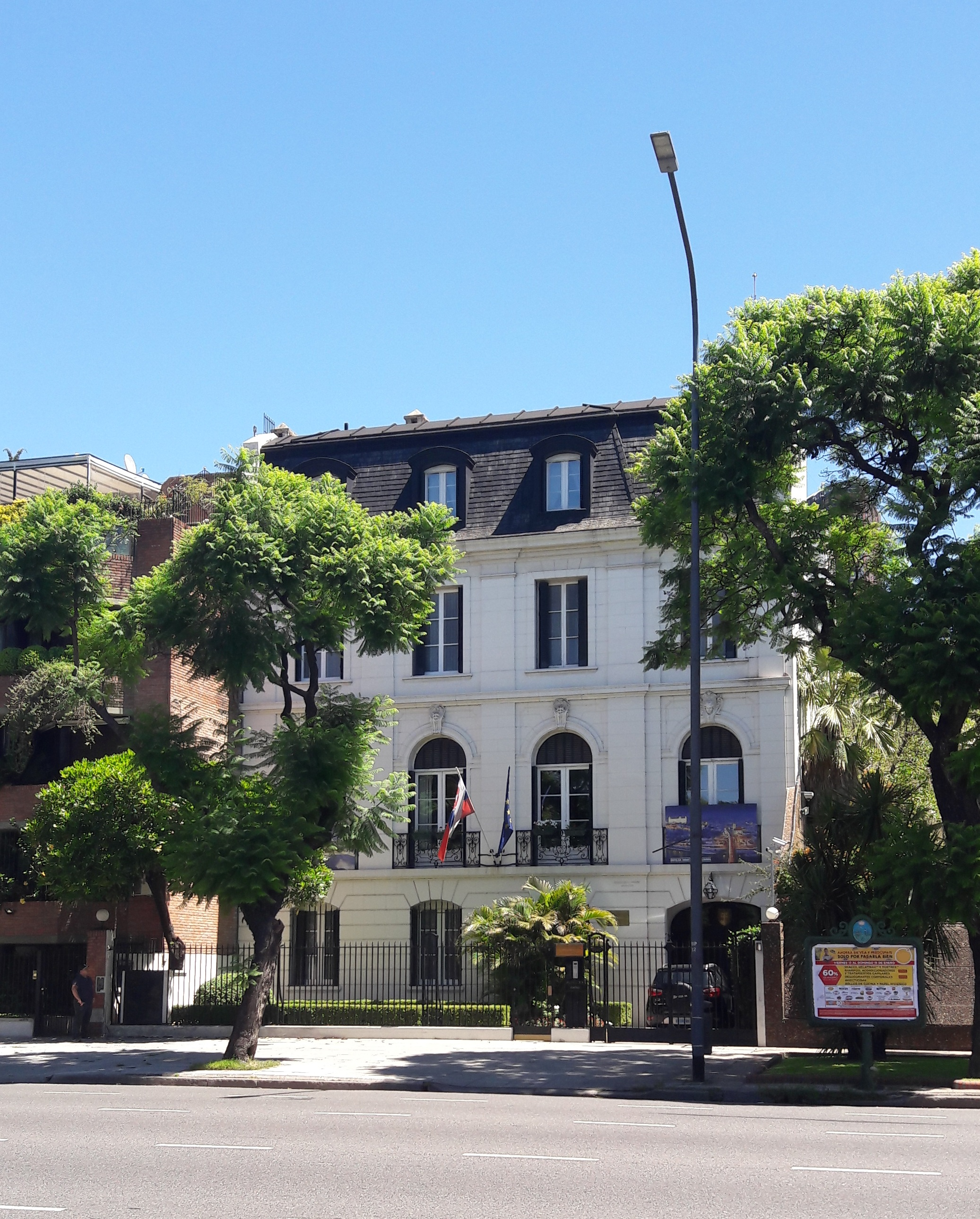 Embajada de Eslovaquia, Palermo, Buenos Aires, Argentina.